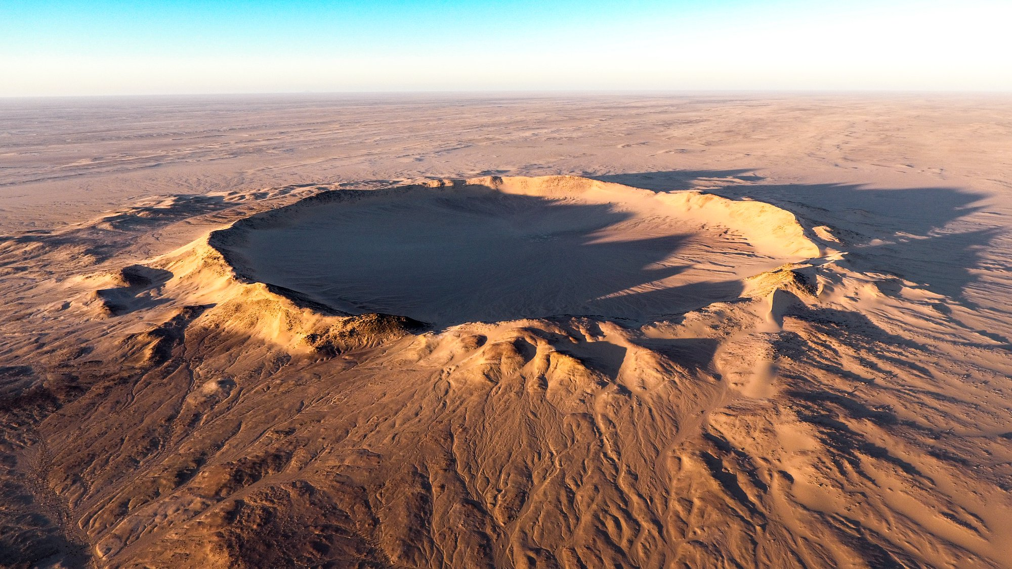 Luftbild Tenoumer Krater Mauritanien